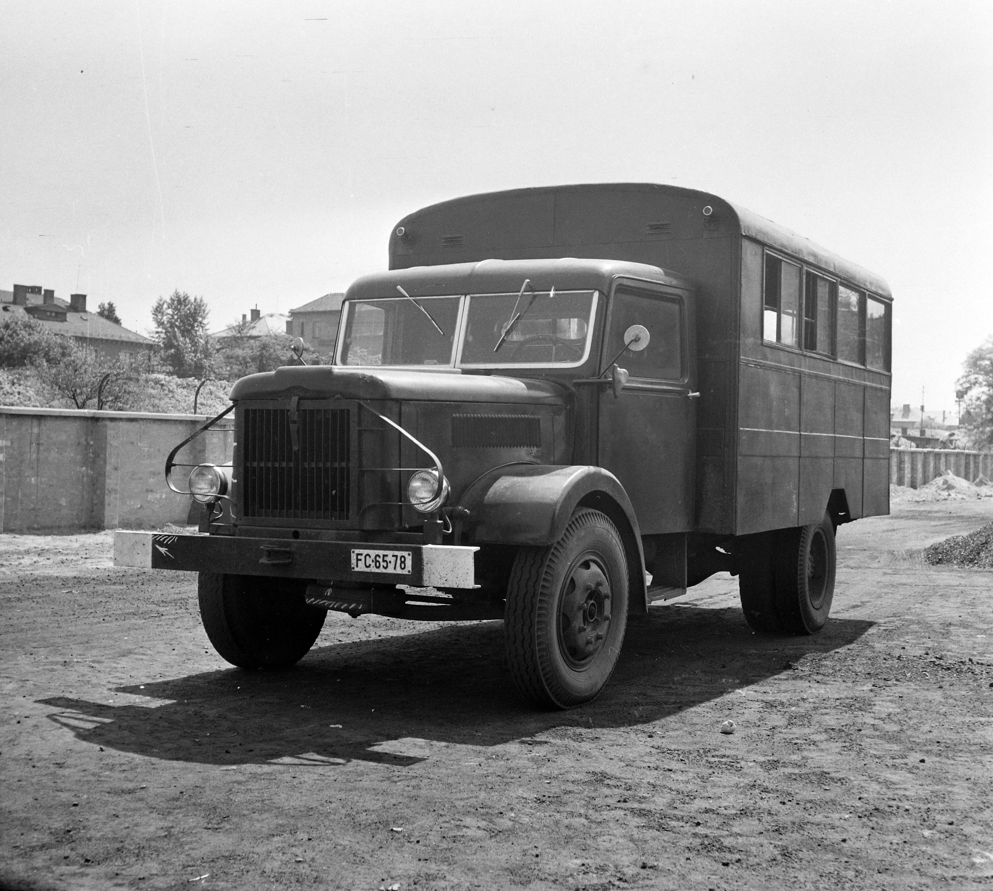 A kép forrását kérjük így adja meg: Fortepan / Budapest Főváros Levéltára. Levéltári jelzet: HU.BFL.XV.19.c.10 Location: Hungary Tags: Csepel-brand, Hungarian brand, number plate Title: A kép forrását kérjük így adja meg: Fortepan / Budapest Főváros Levéltára. Levéltári jelzet: HU.BFL.XV.19.c.10